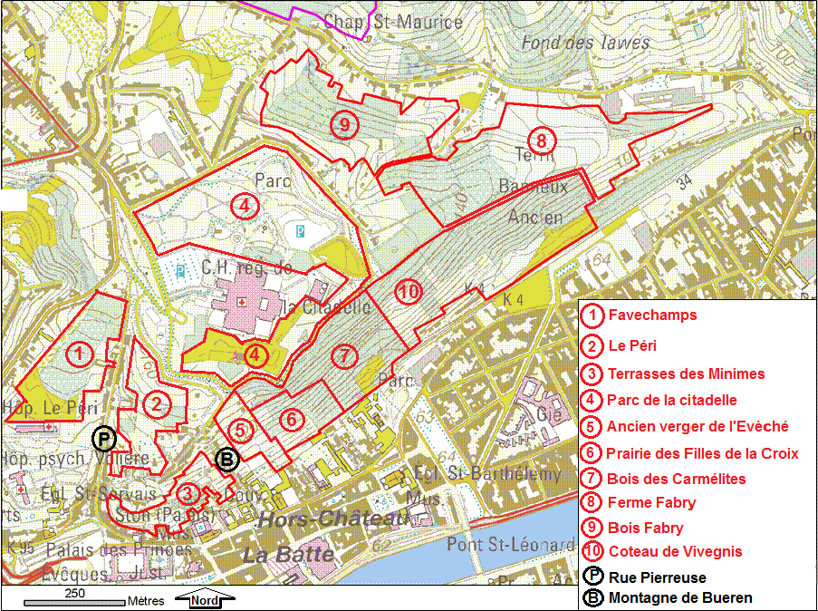 Liège - Coteaux de la Citadelle - Sites de grand intérêt biologique (SGIB)